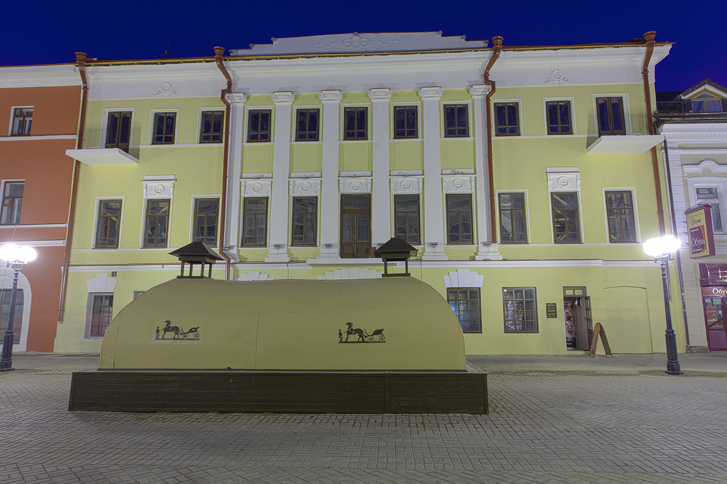 Доходный дом Иванова (Казань, ул.Баумана, 40) 2013 год, ночь